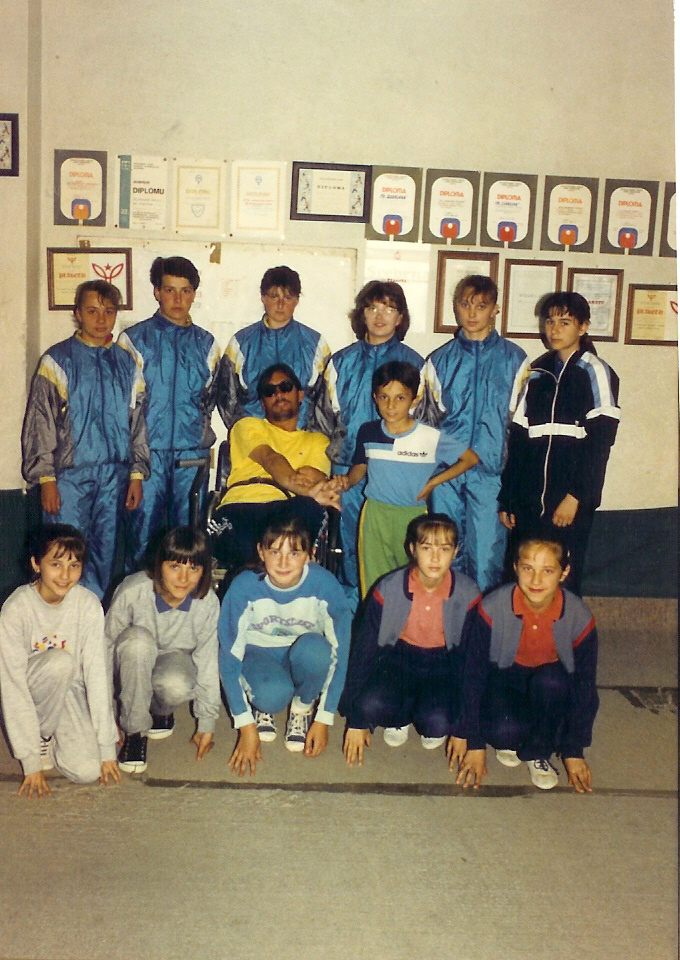 STK Zadrugar Ekipa